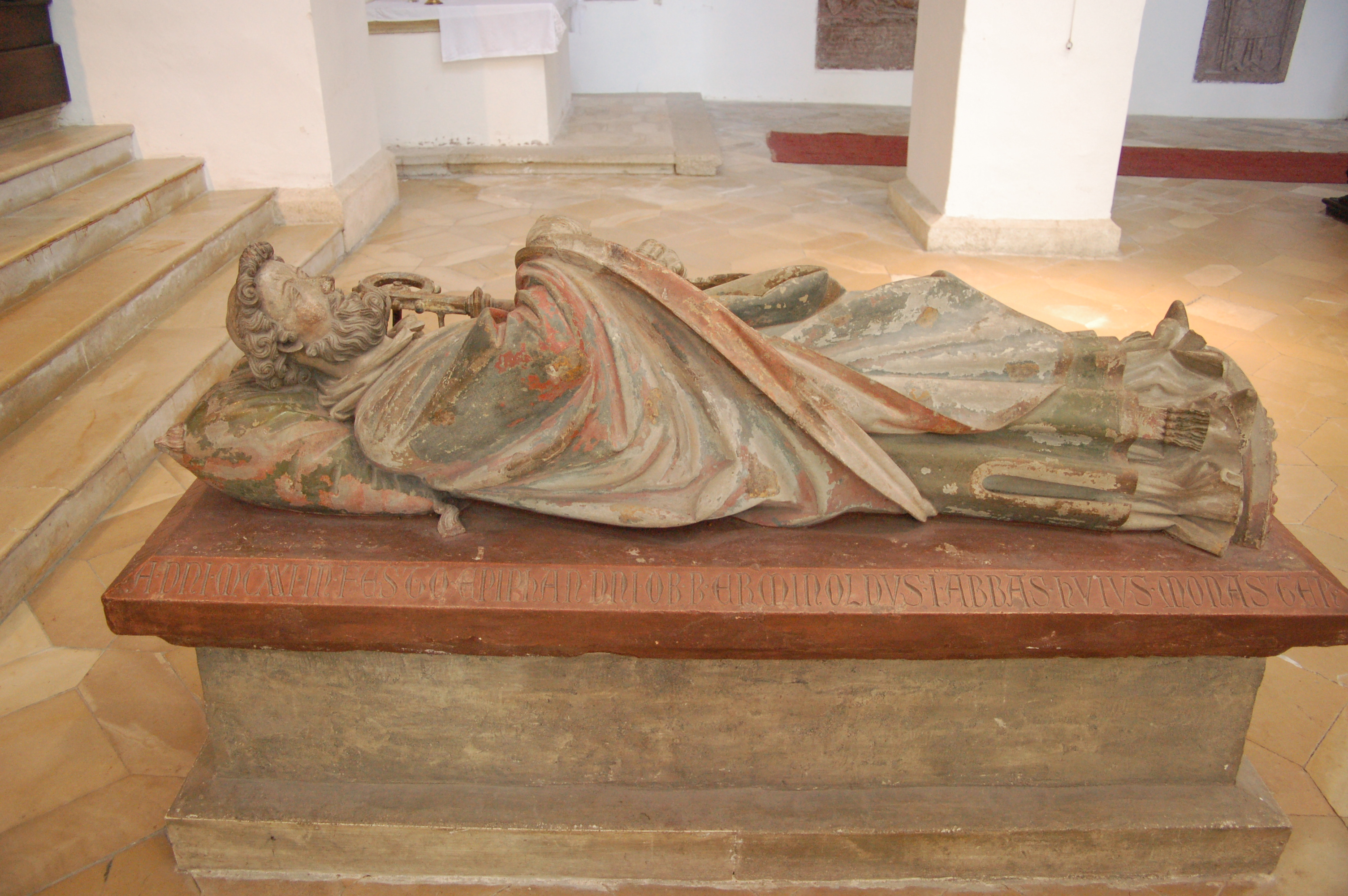 St. Georg Prüfening Regensburg Grave of Erminold in Regensburg